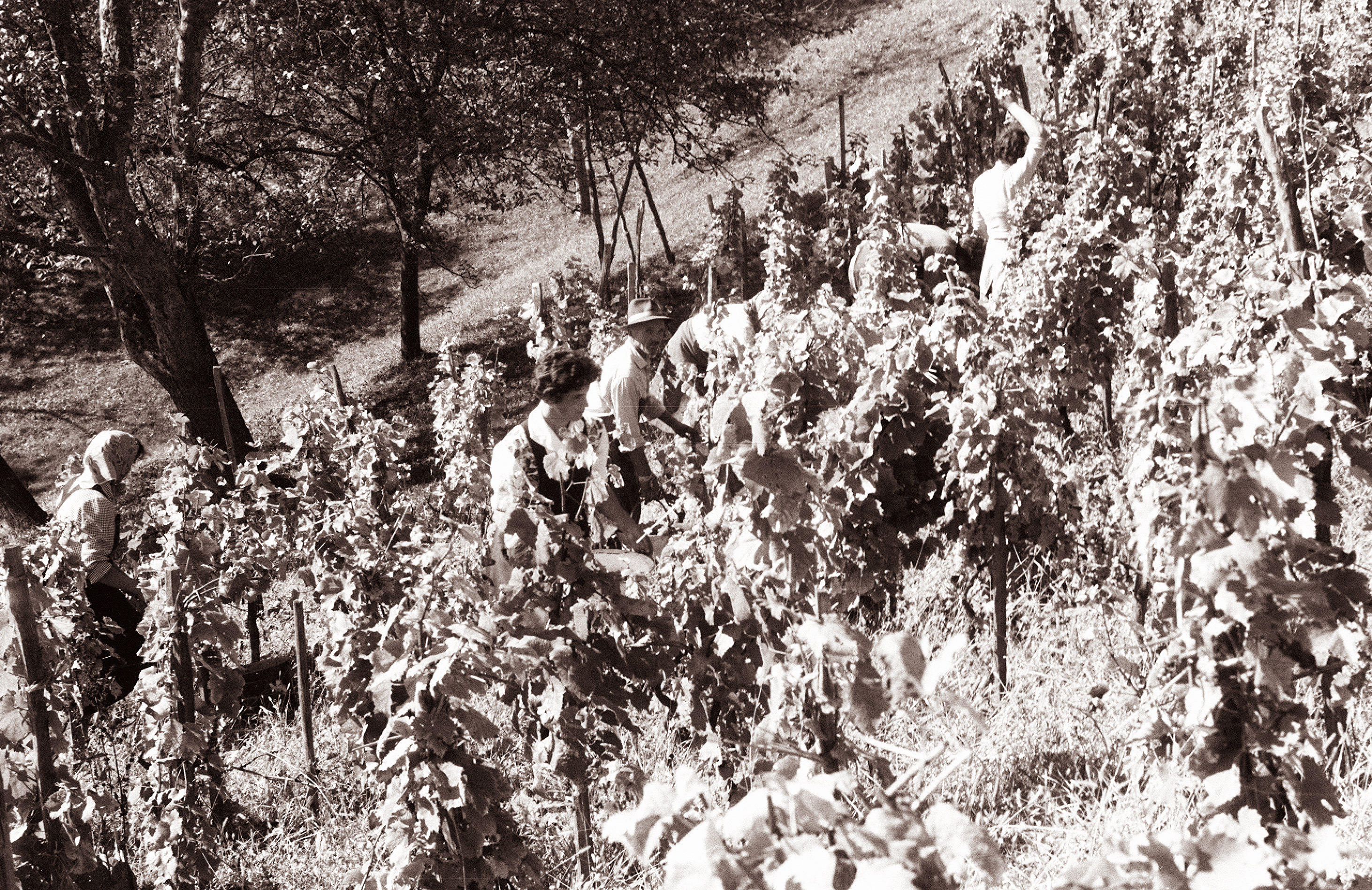 Trgatev v Jeruzalemu